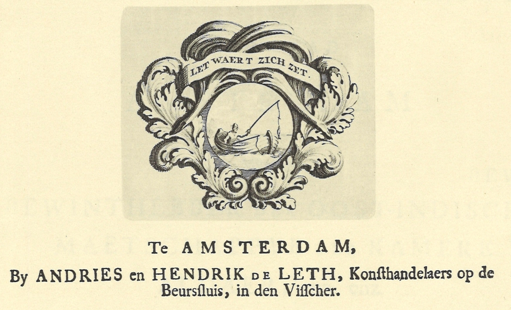 Drukkersmerk en impressum van een titelpagina van Andries en Hendrik de Leth, uitgevers, kunst- en boekhandelaars in de 18e eeuw.